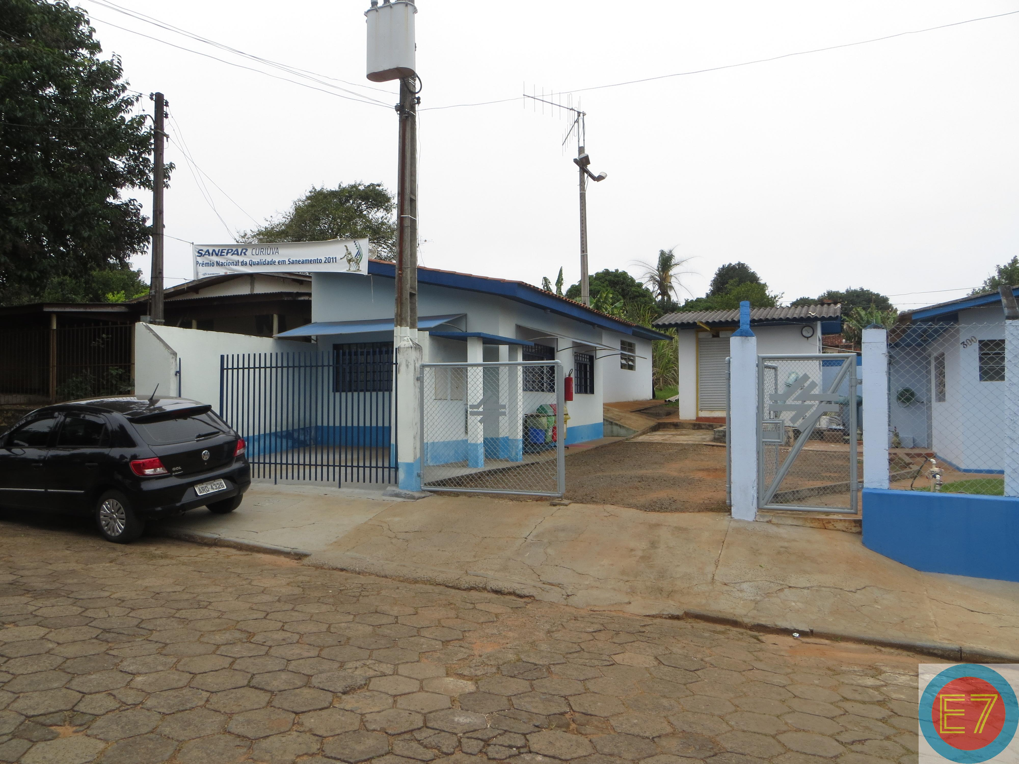 Filial da Sanepar em Curiúva, Estado do Paraná, Brasil.